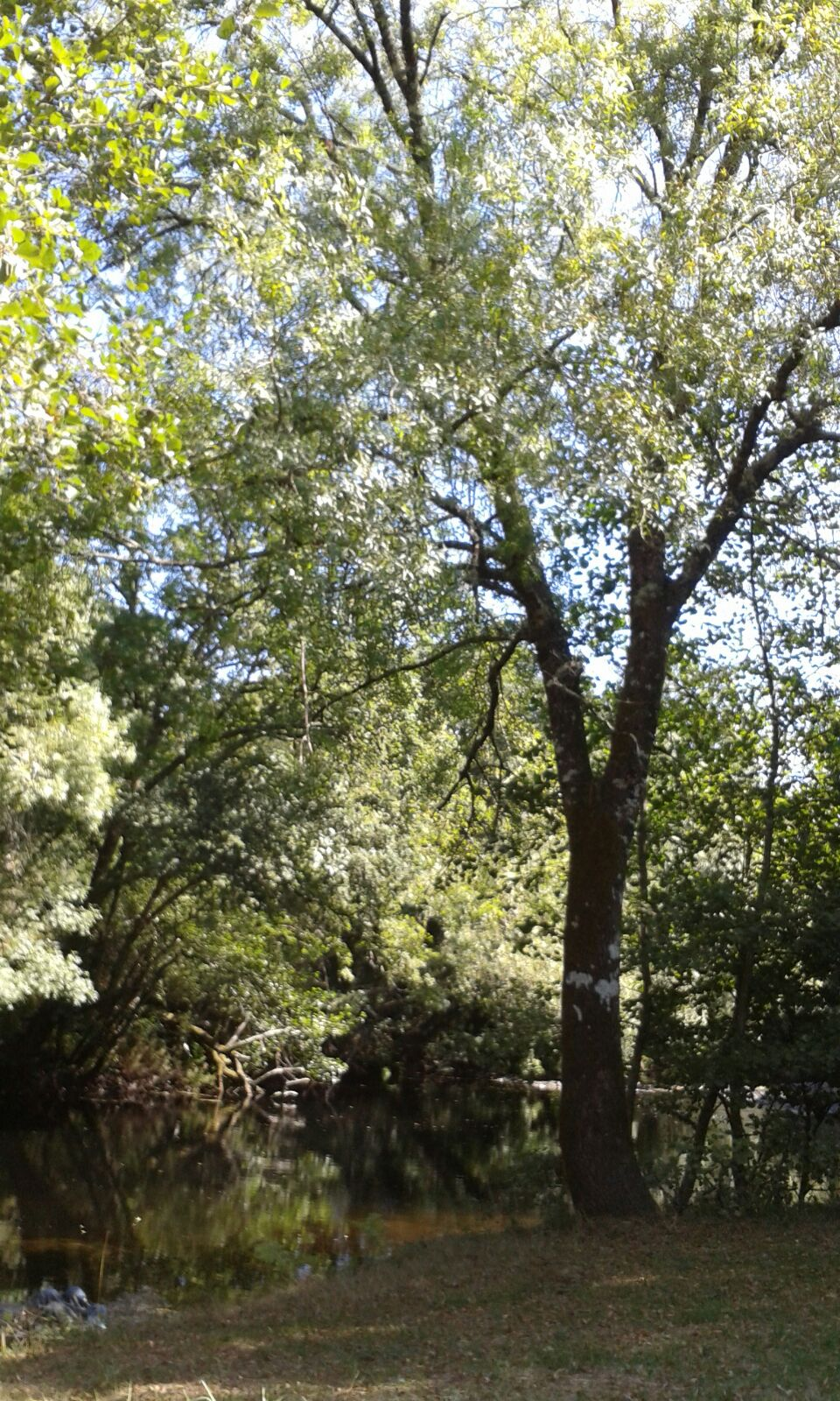 Esta imagen corresponde a una de las zonas habilitadas por los vecinos para el acceso al río de Carmoega, en la zona de A Golada limítrofe con el Concello de Lalín (Pontevedra)